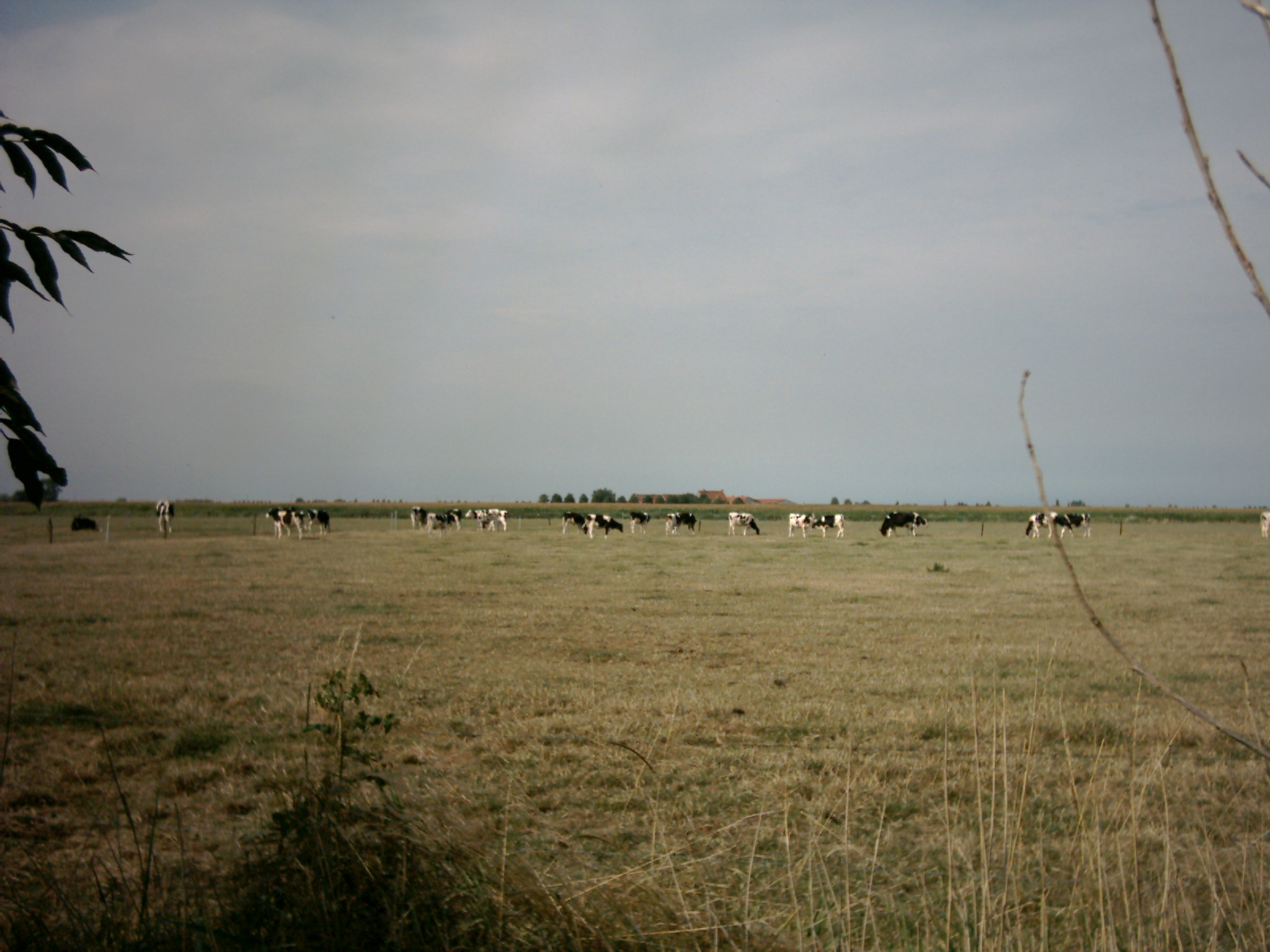 West-Vlams: Foto over de velden van Bachtn de Kupe (zelf genomen).